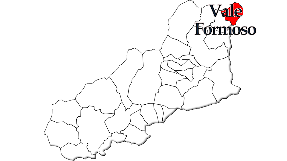 População